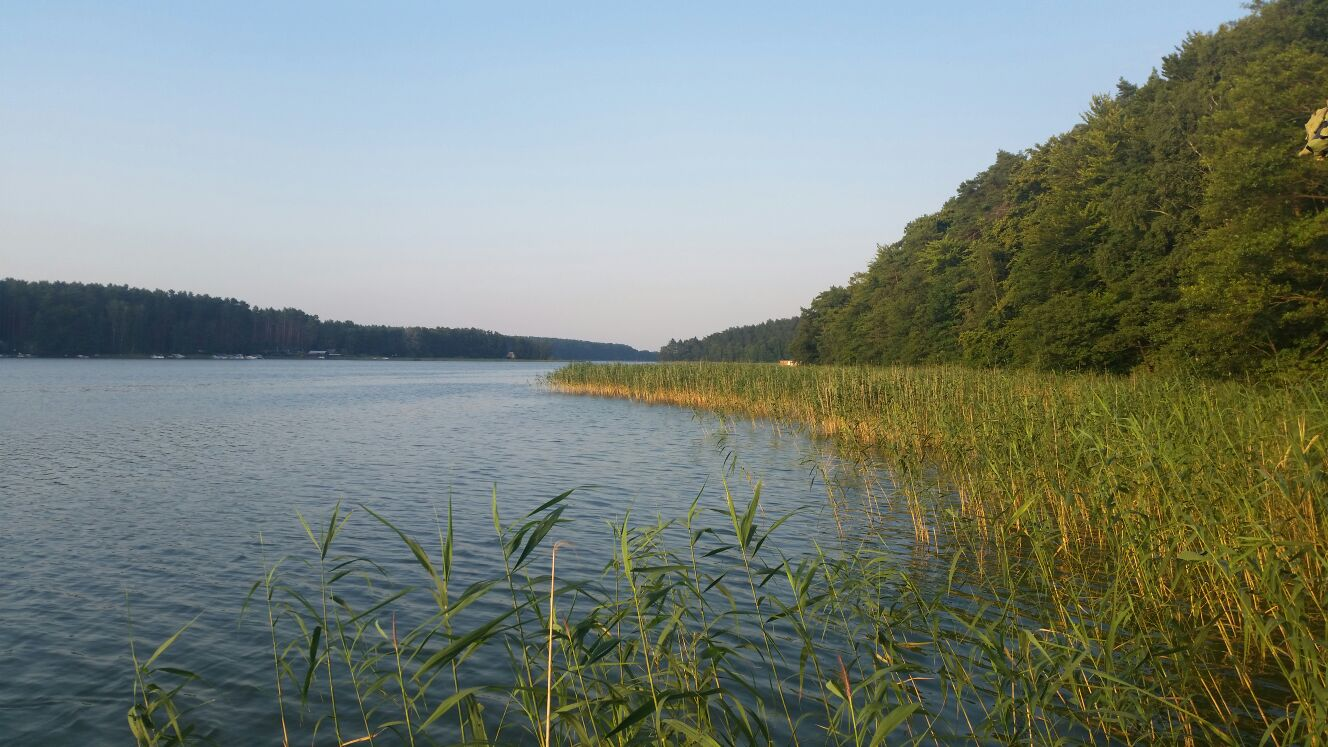 Bucht am südöstlichen Ufer (am südwesltichen Ende) des Großen Pälitzsees mit Blick nach Ostnordost.